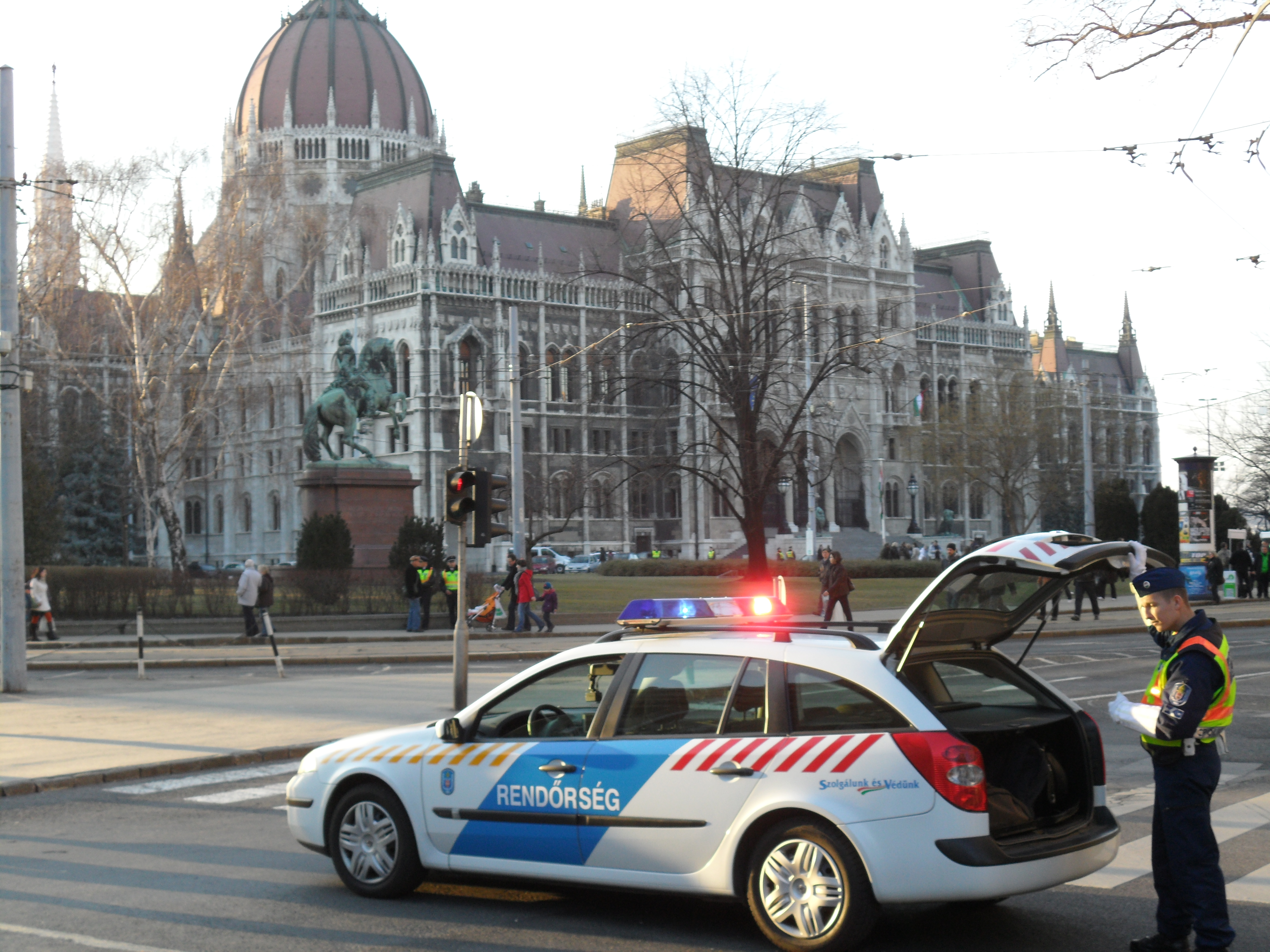 Demonstrations at Parliament of Hungary in March 2012